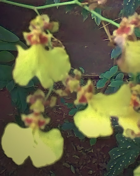 Fotografia da orquídea Oncidium flexuosum existente em meu jardim.